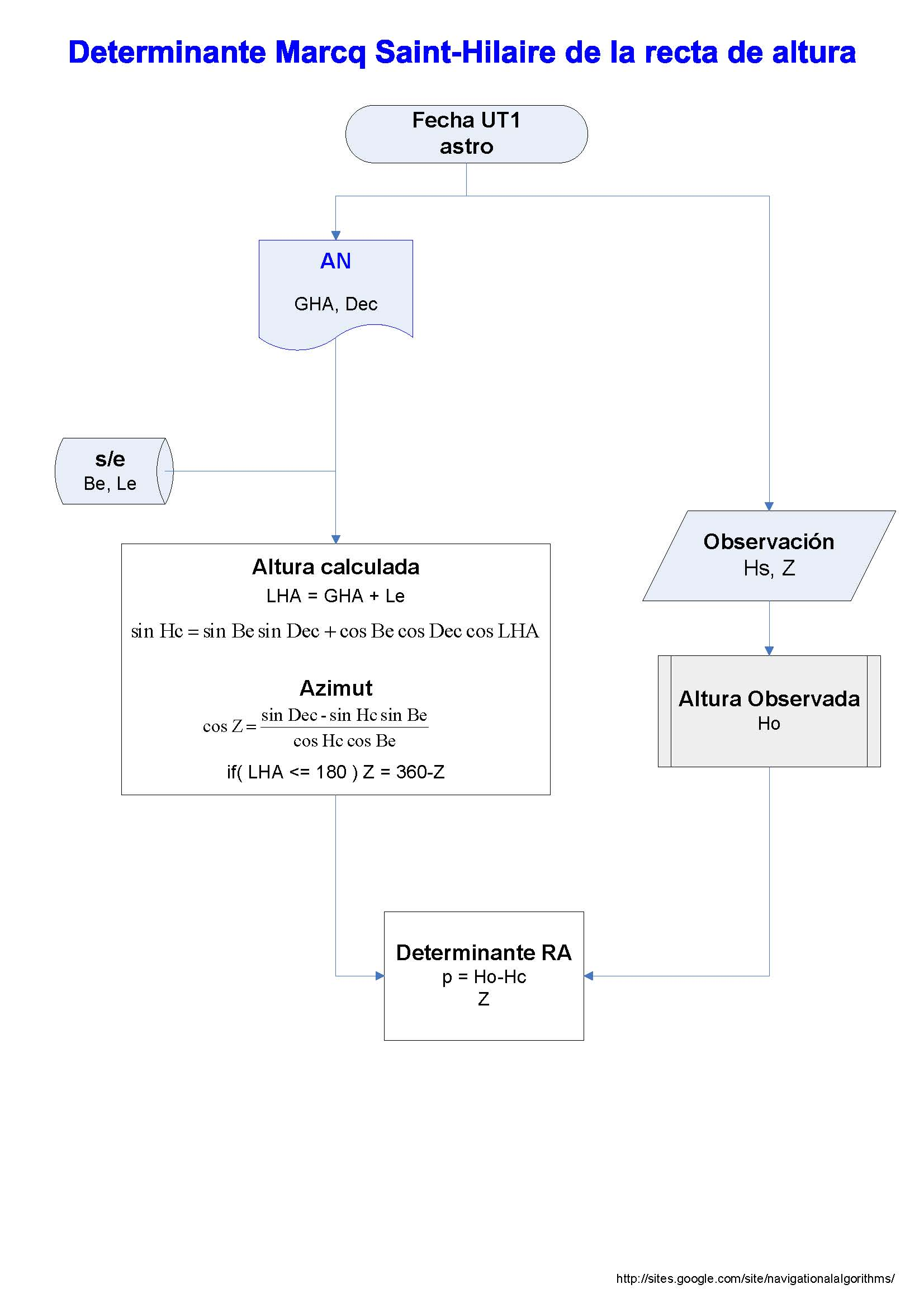 Proceso de cálculo del determinate de la recta de altura tangente punto aproximado o Marcq Saint Hilaire